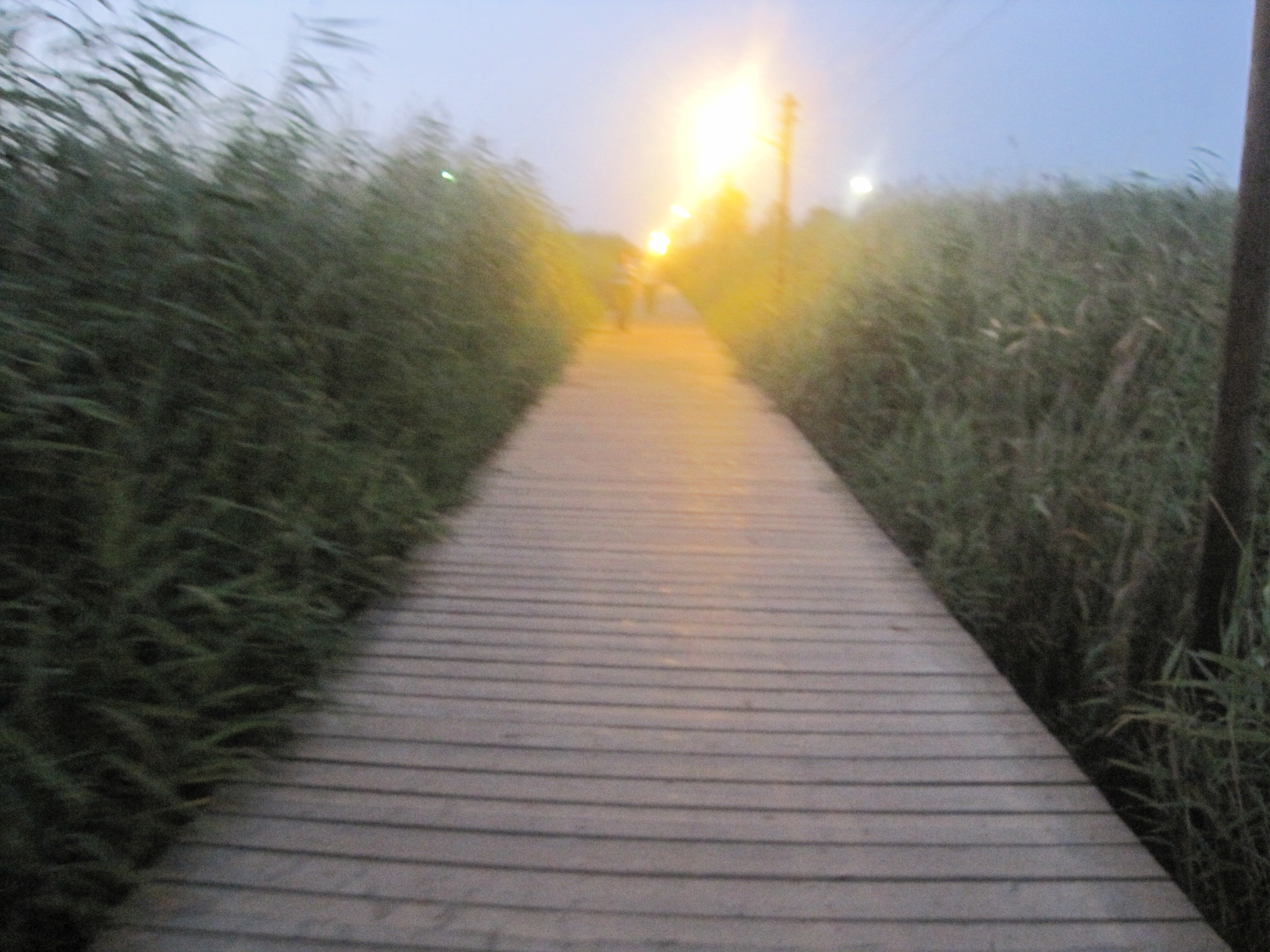 پل چوبی بندر کیاشهر